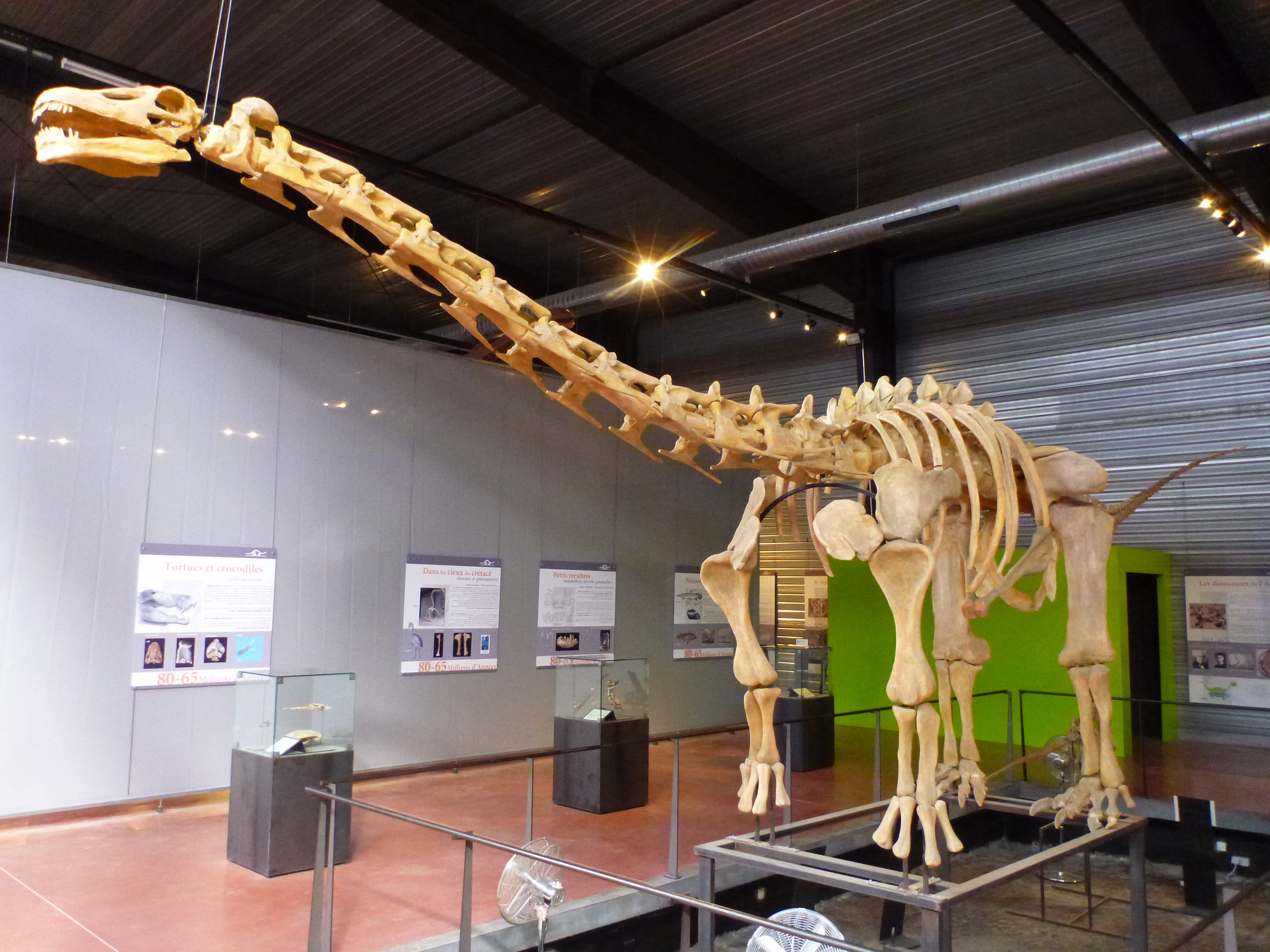 Mounted skeleton of Ampelosaurus, Musée des dinosaures, Esperaza, France